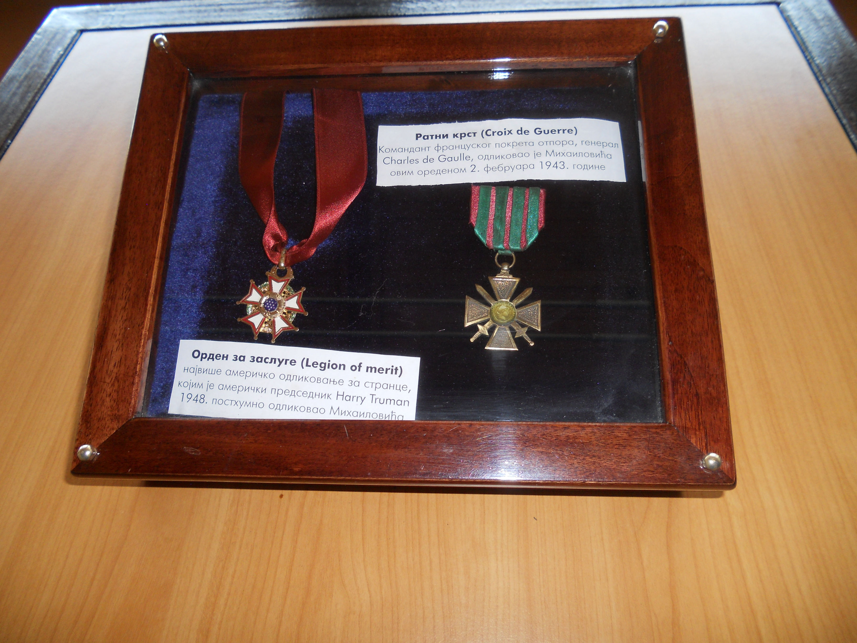 Spomen kompleks Ravna Gora